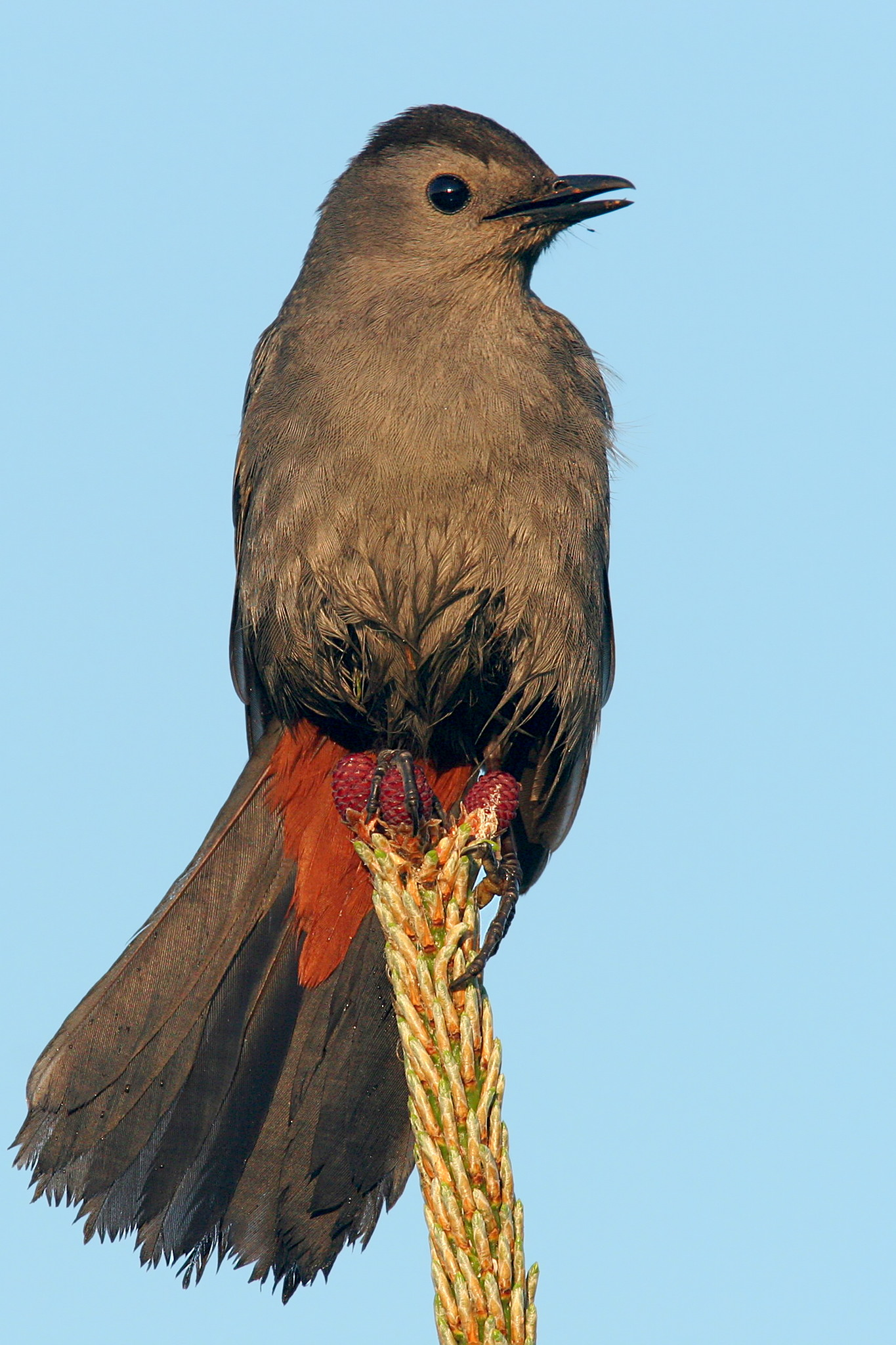 Grey Catbird / Dumetella carolinensis